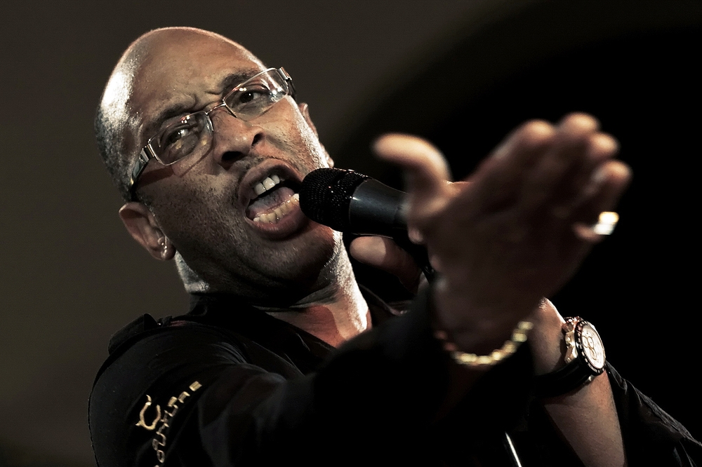 Jesse Lee Davis bei einem Konzert im Mai 2012 in Ludwigsburg